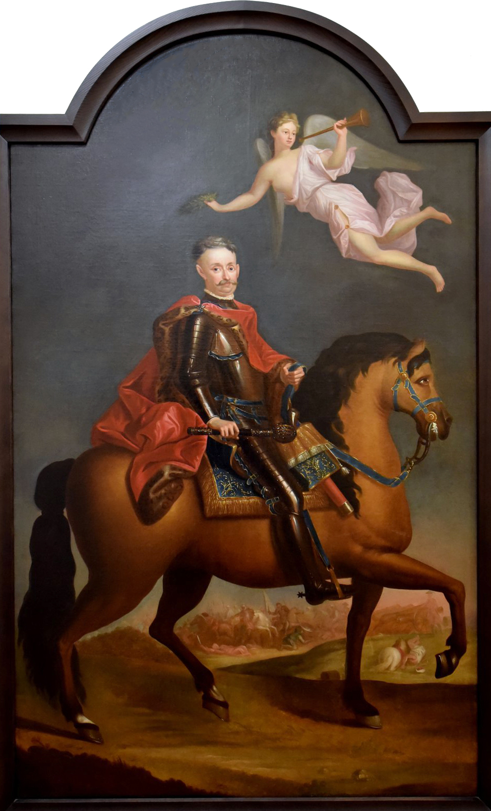 Беларуская (тарашкевіца): Партрэт Казімера Яна Сапегі (Kazimier Jan Sapieha)